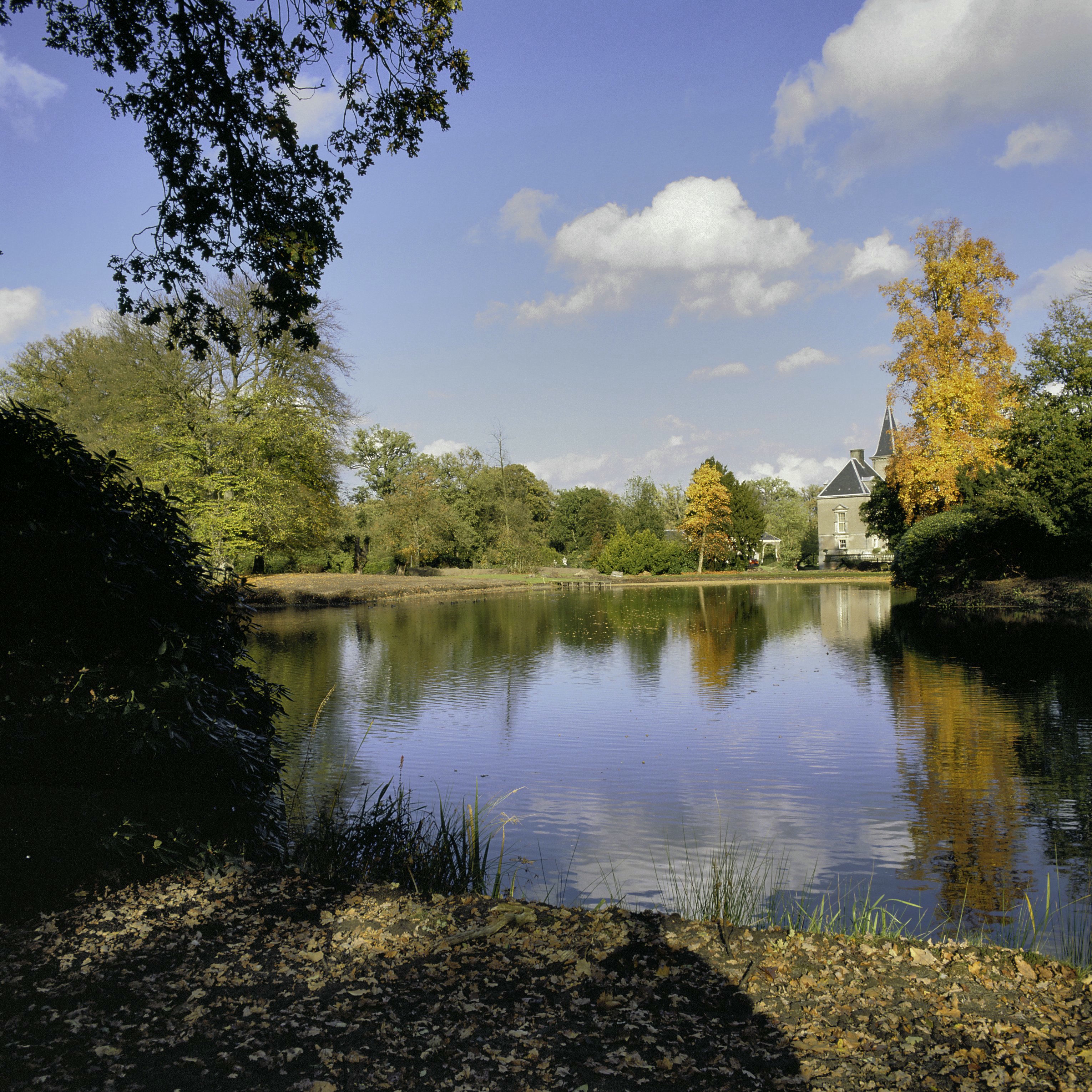 Huis Twickel: Overzicht parkvijver met kasteel rechts